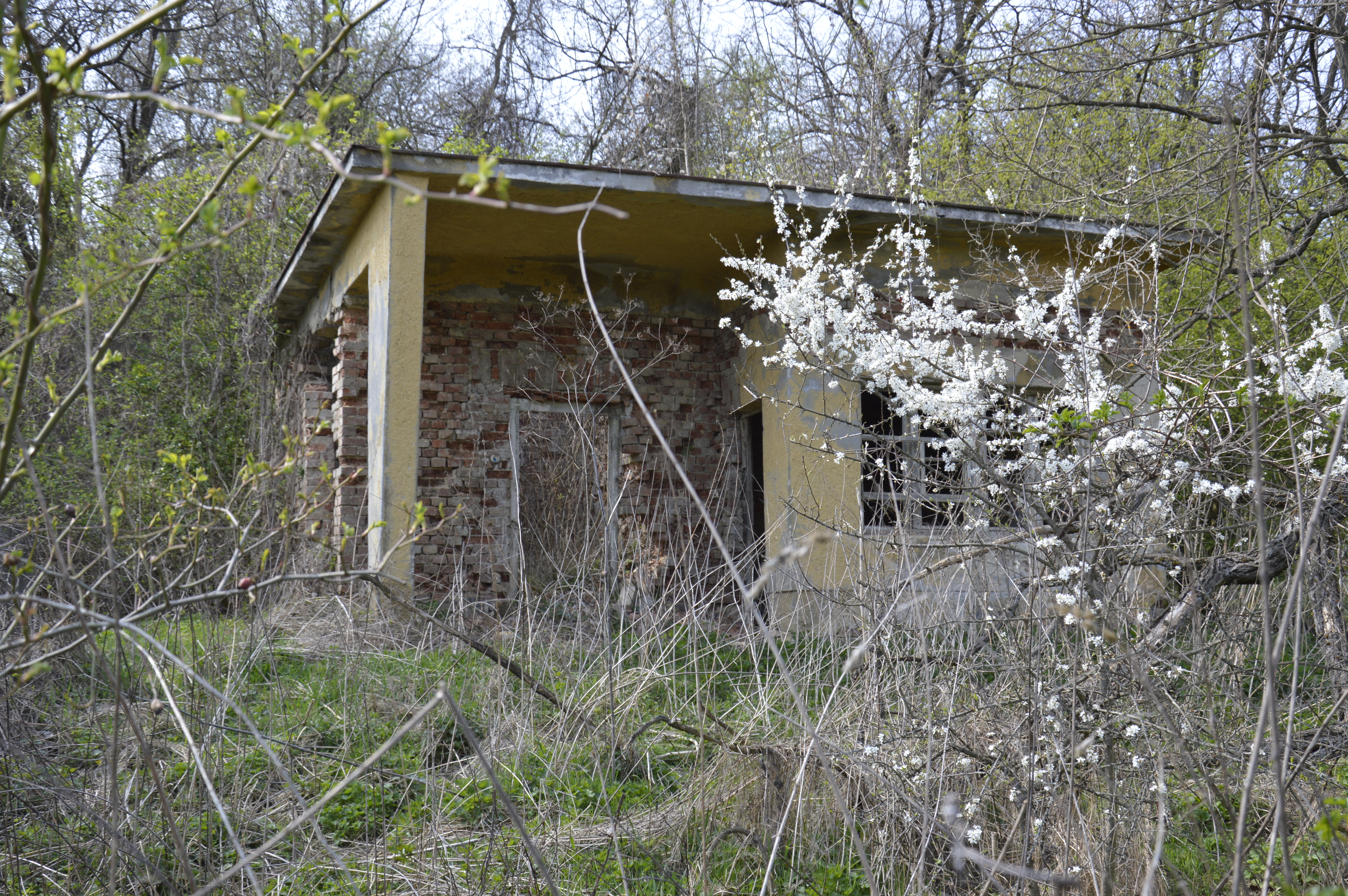 Úttörővasút romok 6